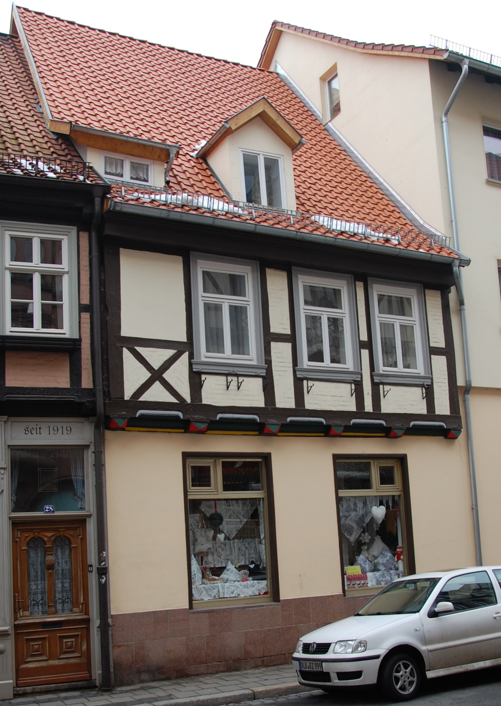 Haus Heiliggeiststraße 29 in Quedlinburg